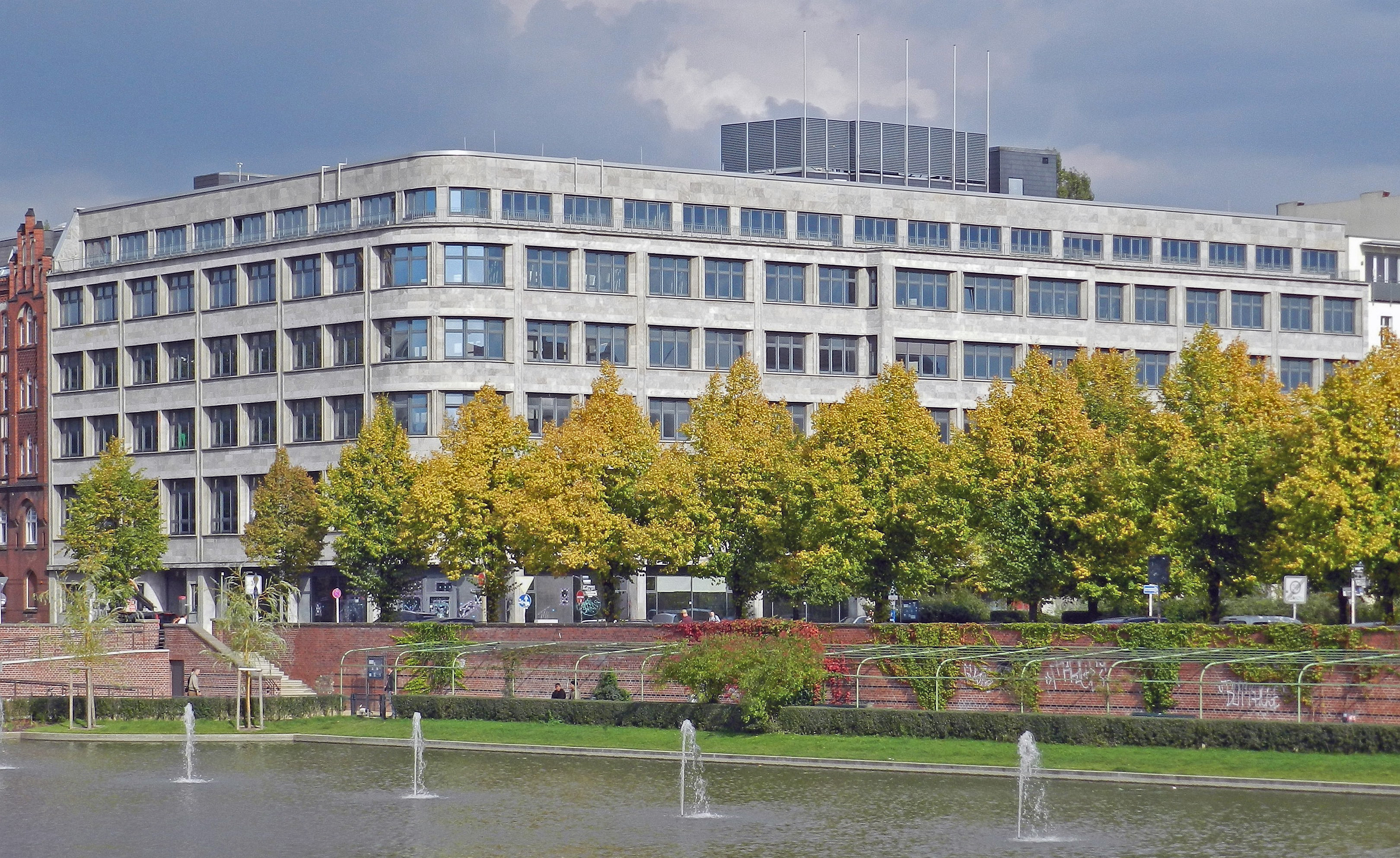 Ehemaliges Verbandshaus des Deutschen Verkehrsbundes (Engeldamm 70, Berlin-Mitte), errichtet 1927-32, Architekten: Bruno Taut (Entwürfe 1927) und Max Taut.